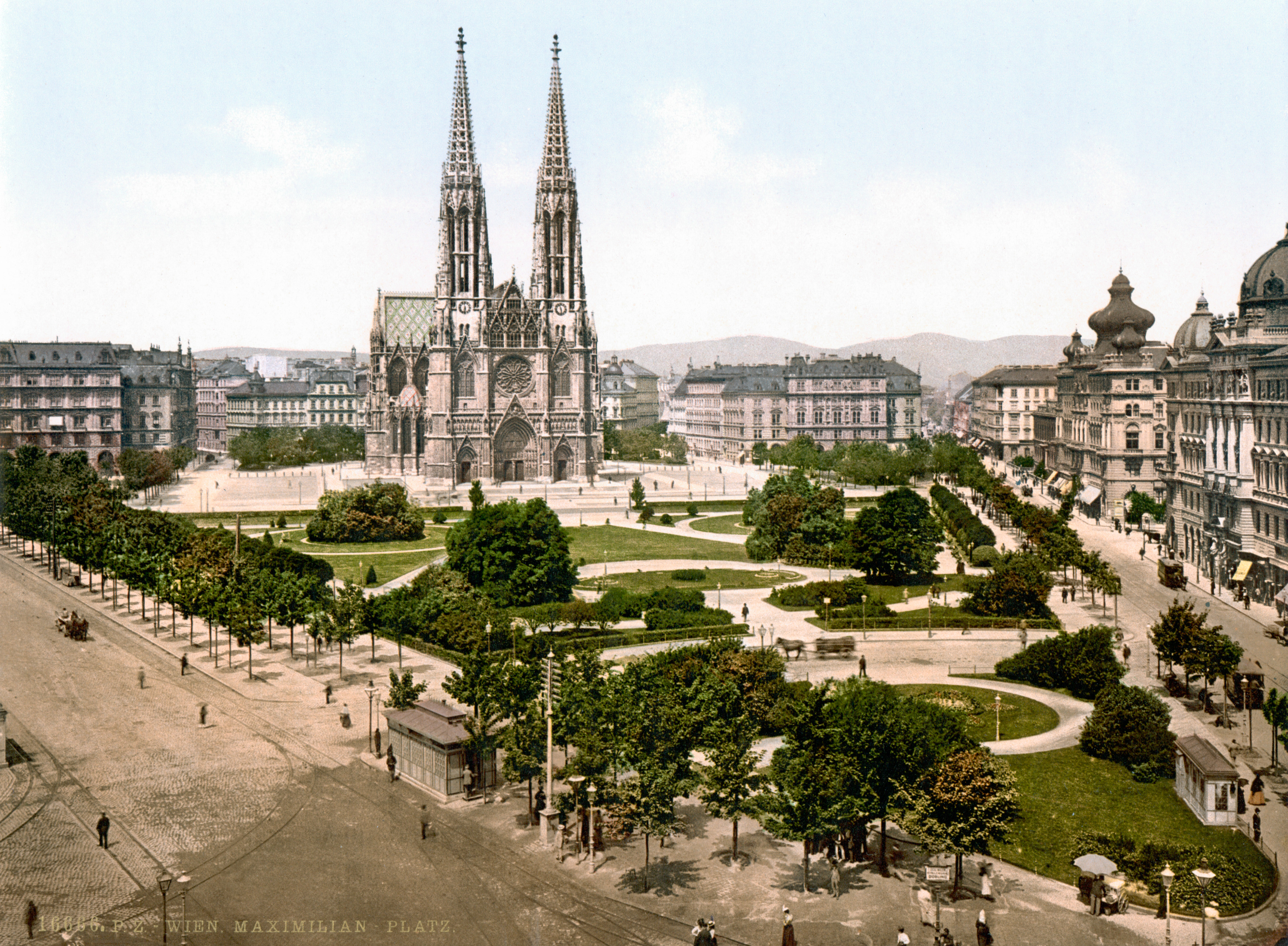 Wien Votivkirche zwischen 1890 und 1900